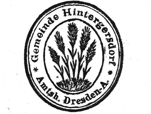 Wappen der Gemeinde Hintergersdorf, Stempel vor 1926